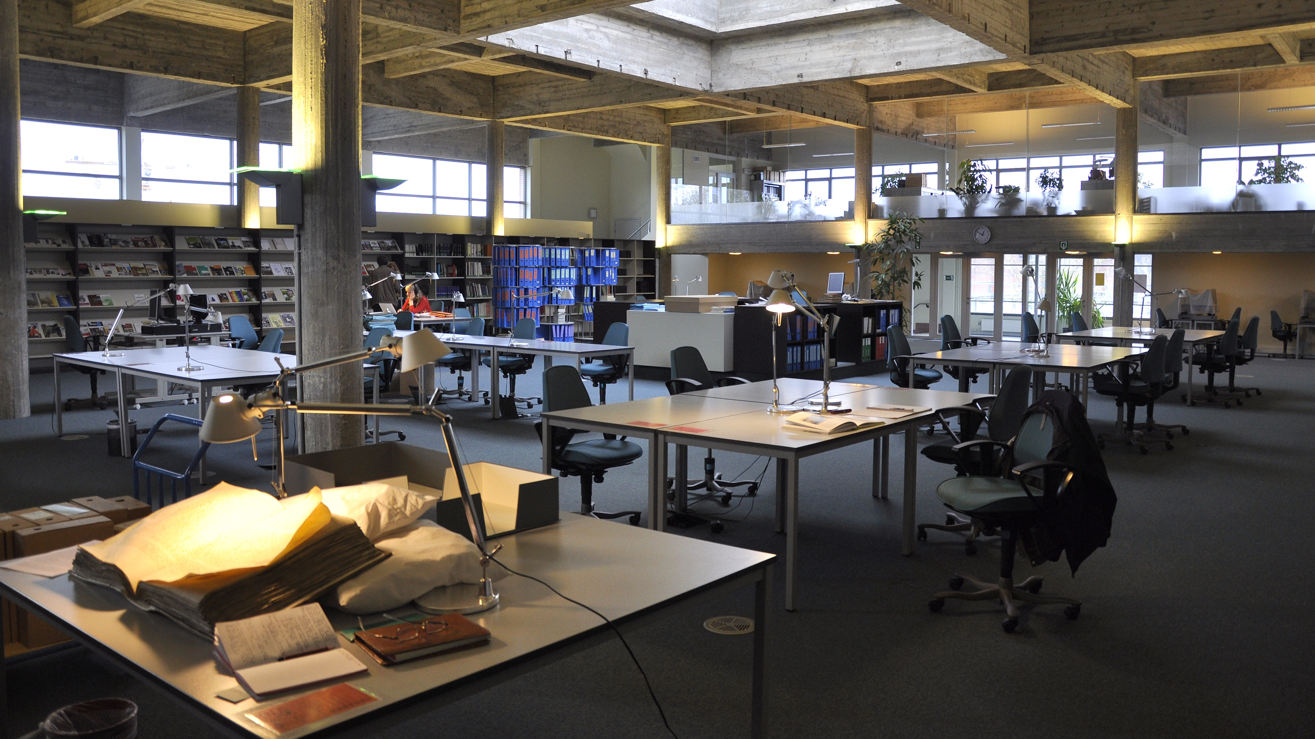 Gentbrugge De Zwarte Doos leeszaal 16-04-2012 11-58-50 This photo of immovable heritage has been taken in the Flemish Region